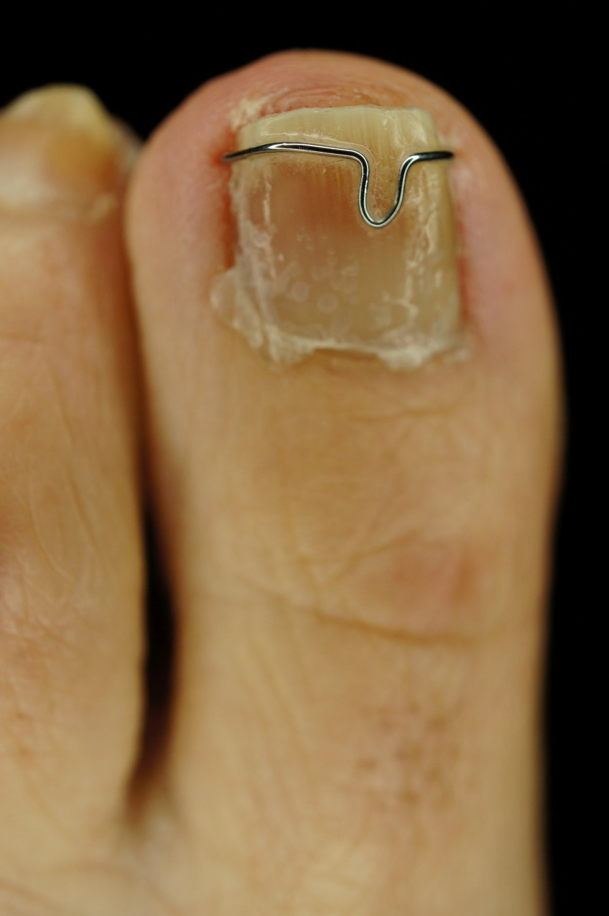 Konservative Behandlung des Unguis incarnatus mittels Nagelspange (Orthonyxiespange)